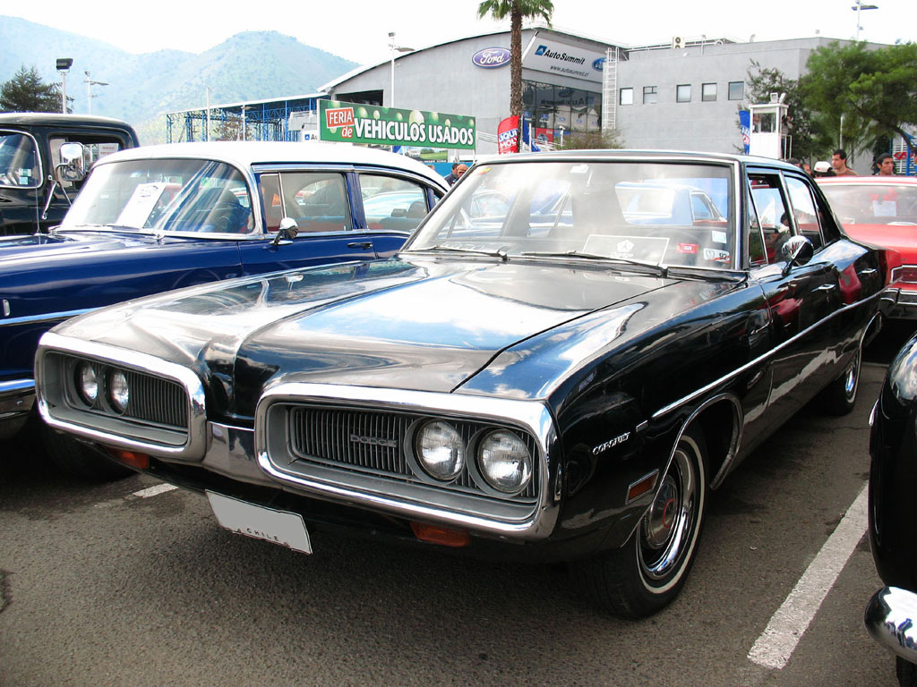 Dodge Coronet Sedan 1970